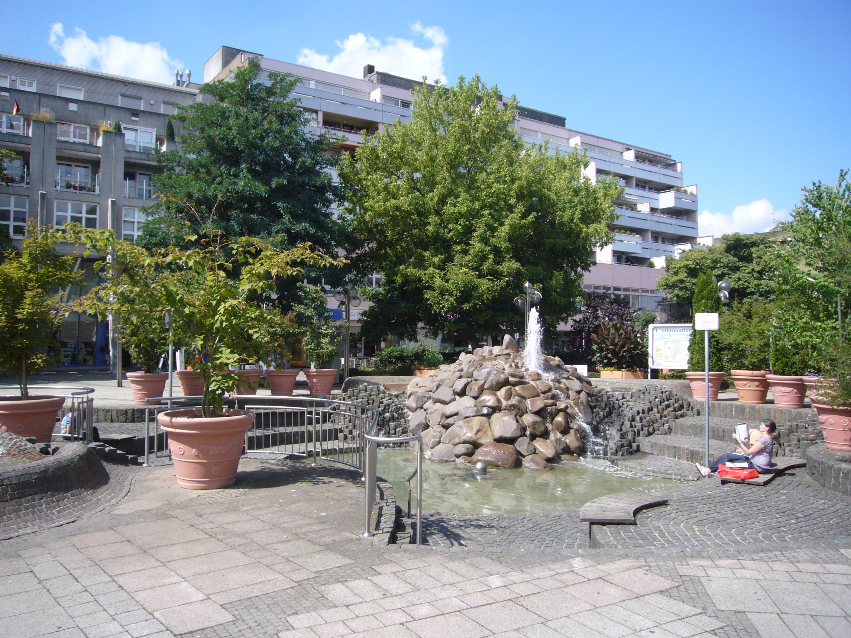 Odilienbrunnen Dillingen/Saar